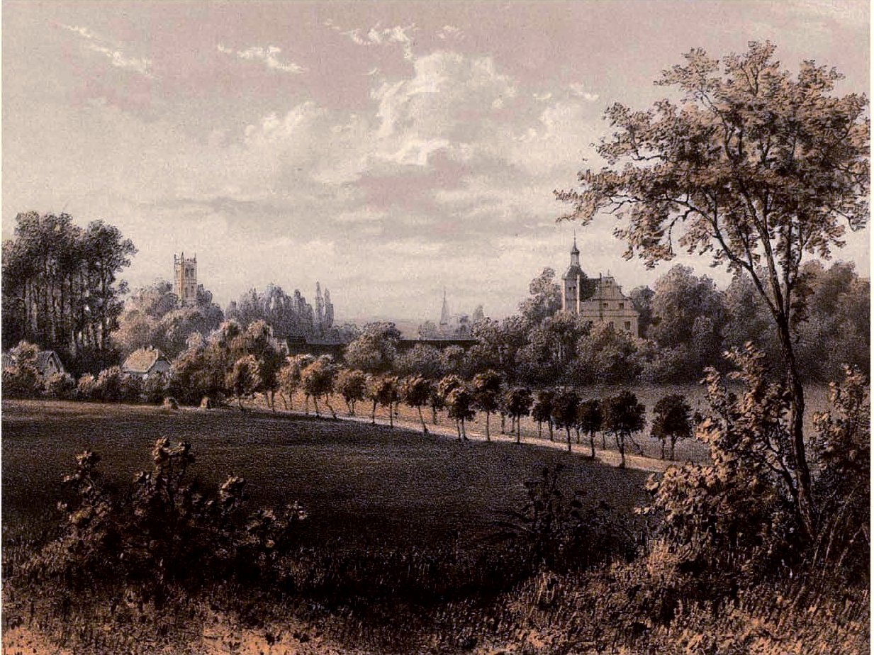 Gut Wintdorf, Kreis Cottbus, Kreis Cottbus, Provinz Brandenburg